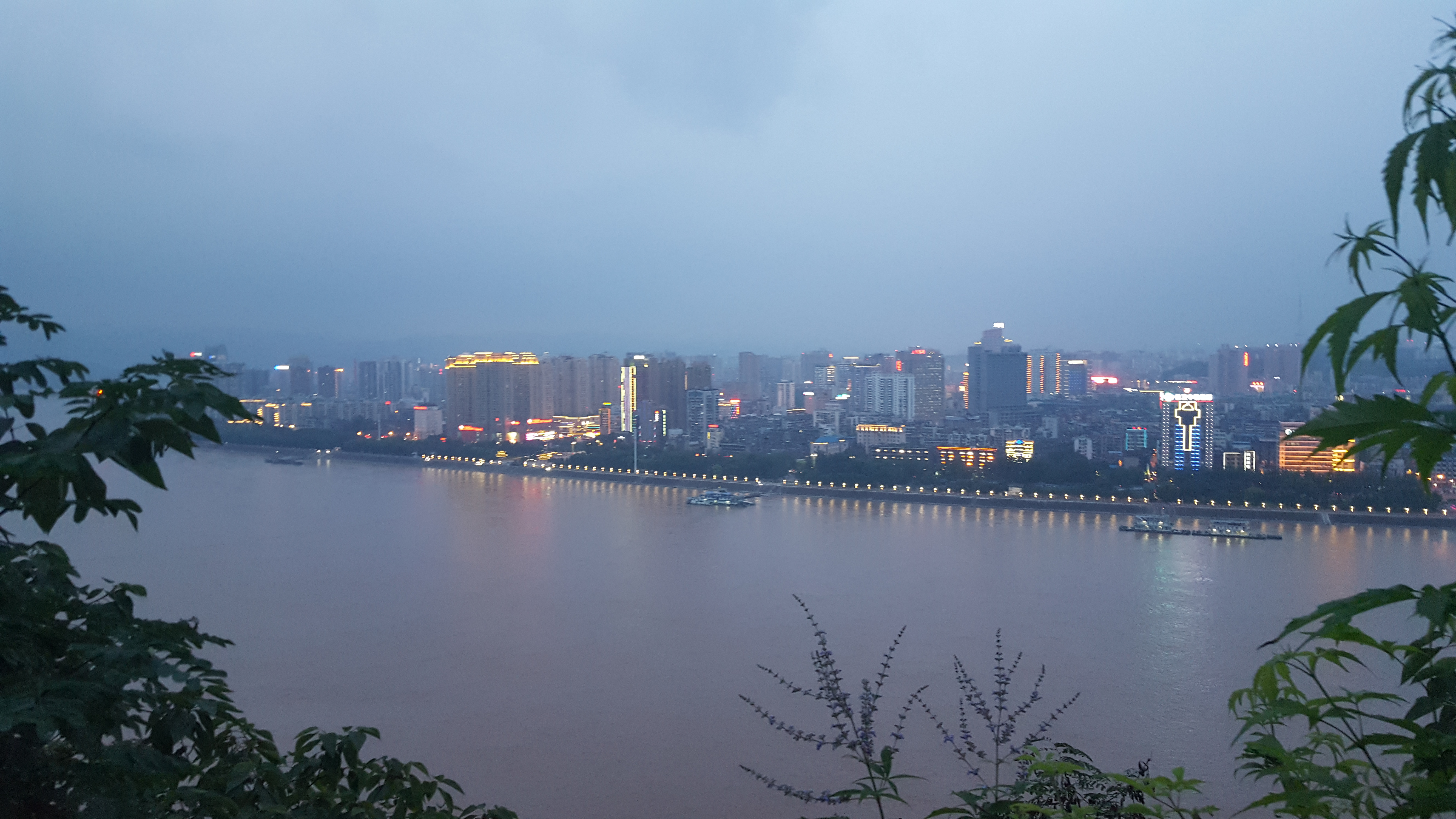 中文（中国大陆）: 磨基山拍摄的宜昌夜景